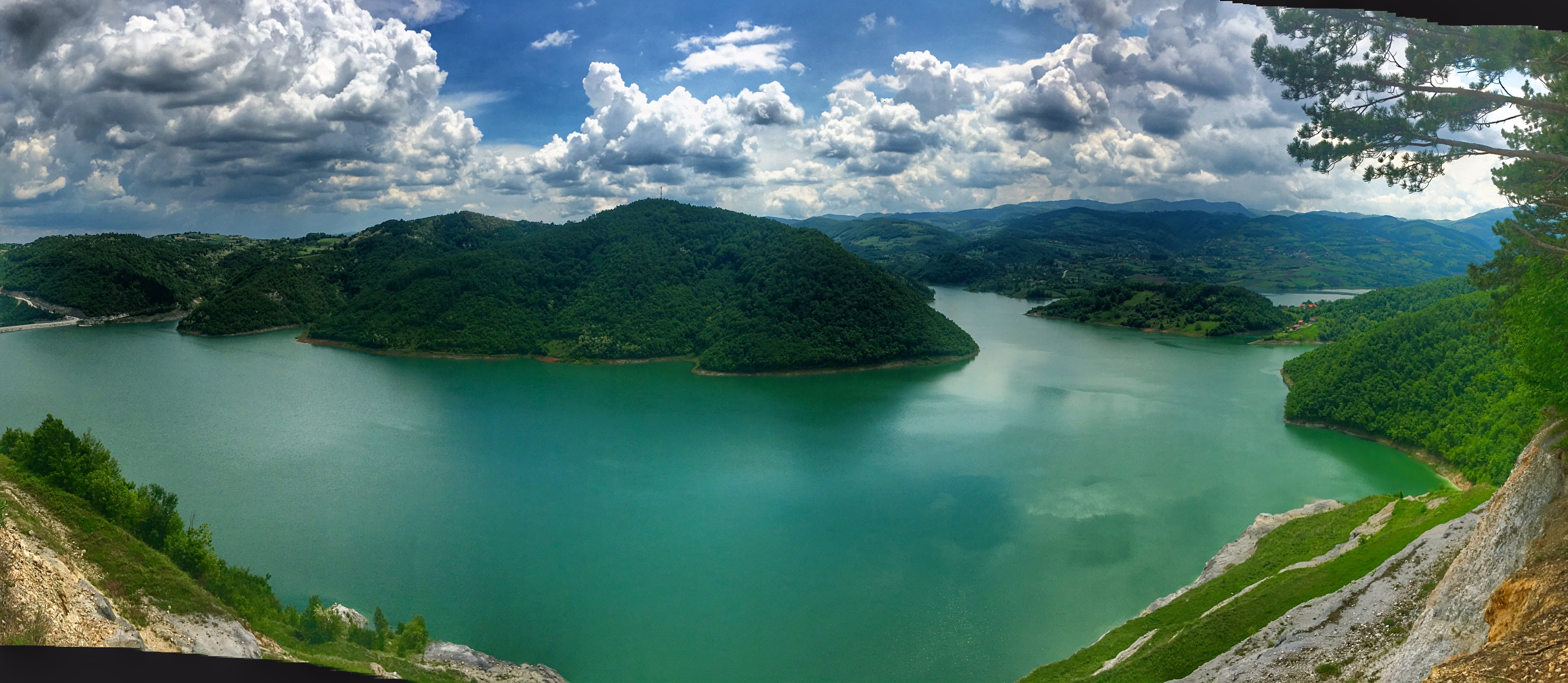 Rovni jezero